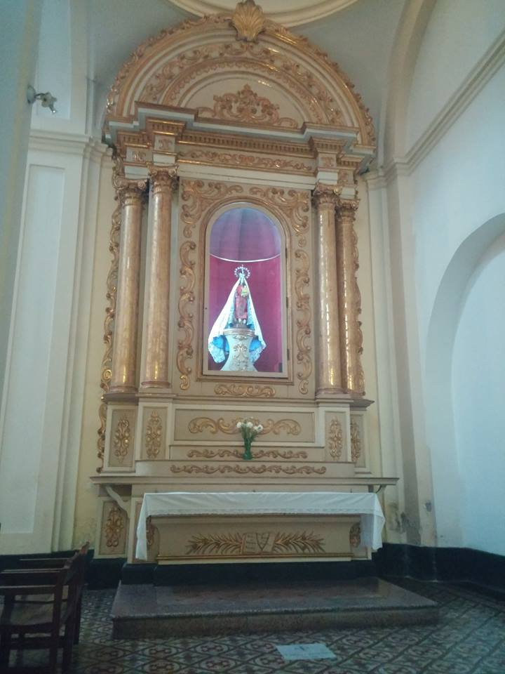 se lo trajo de la antigua capital de Tucuman